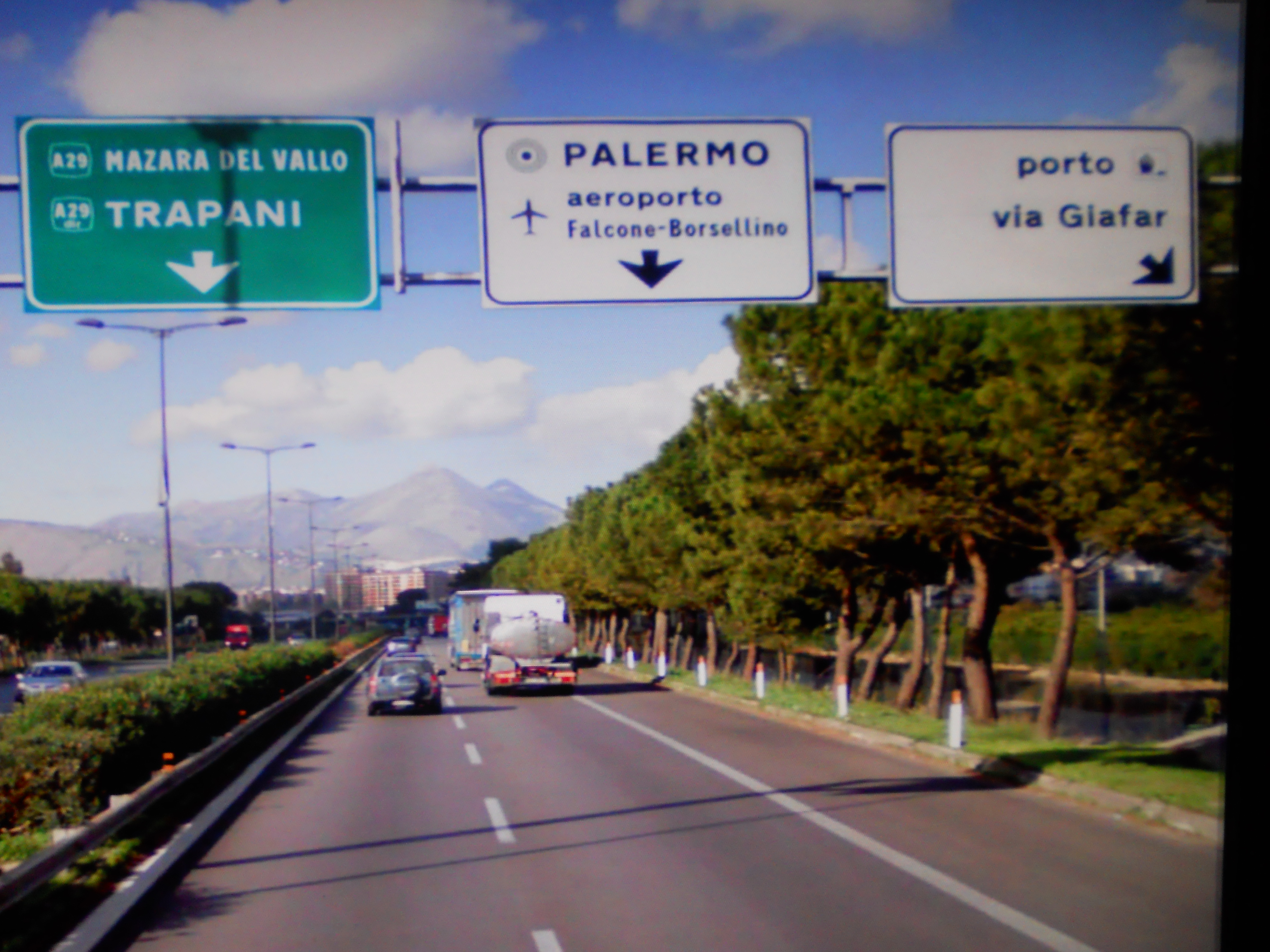 Autostrada A19 nei pressi dello svincolo via Giafar per Palermo